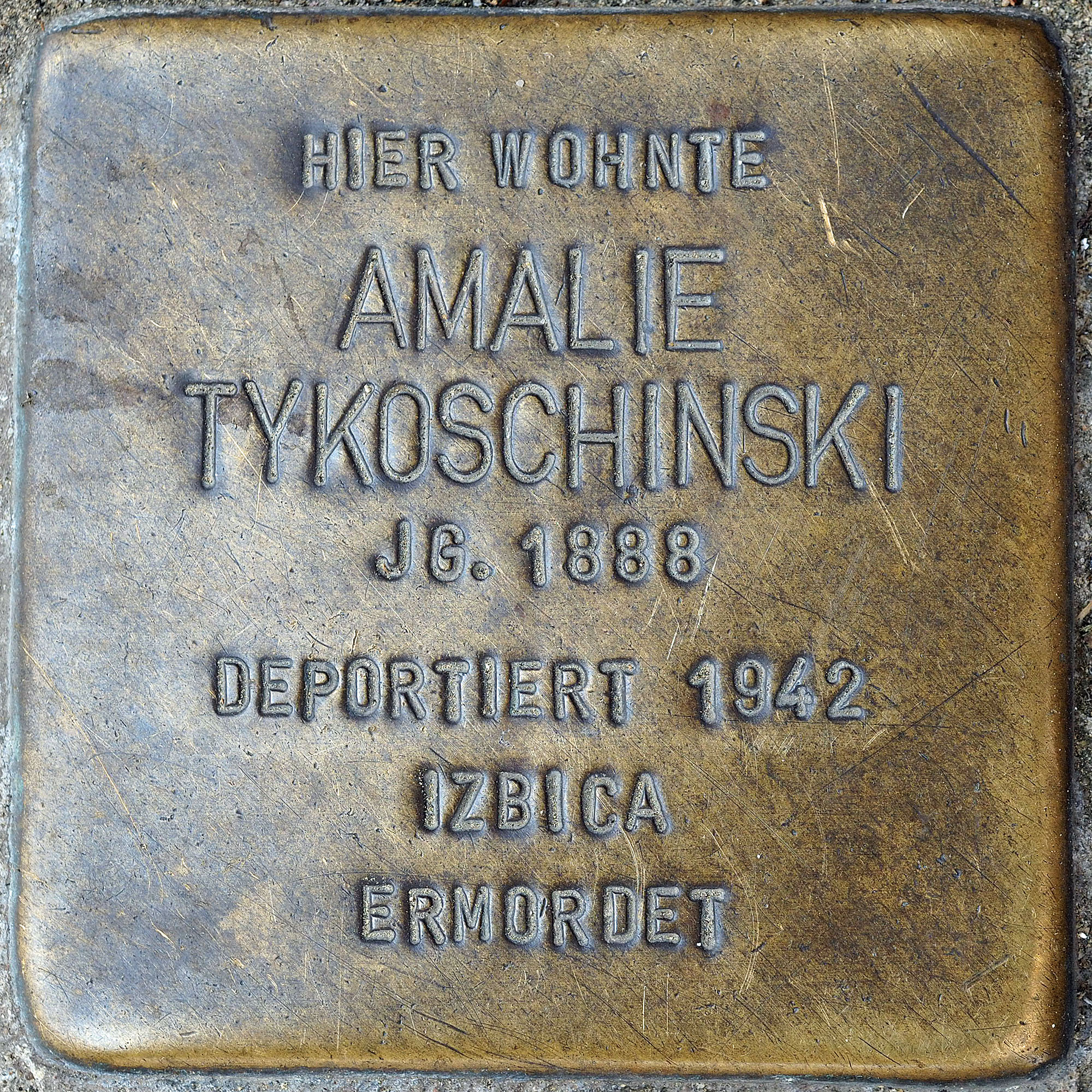 Stolpersteine MG: Tykoschinski, Amalie